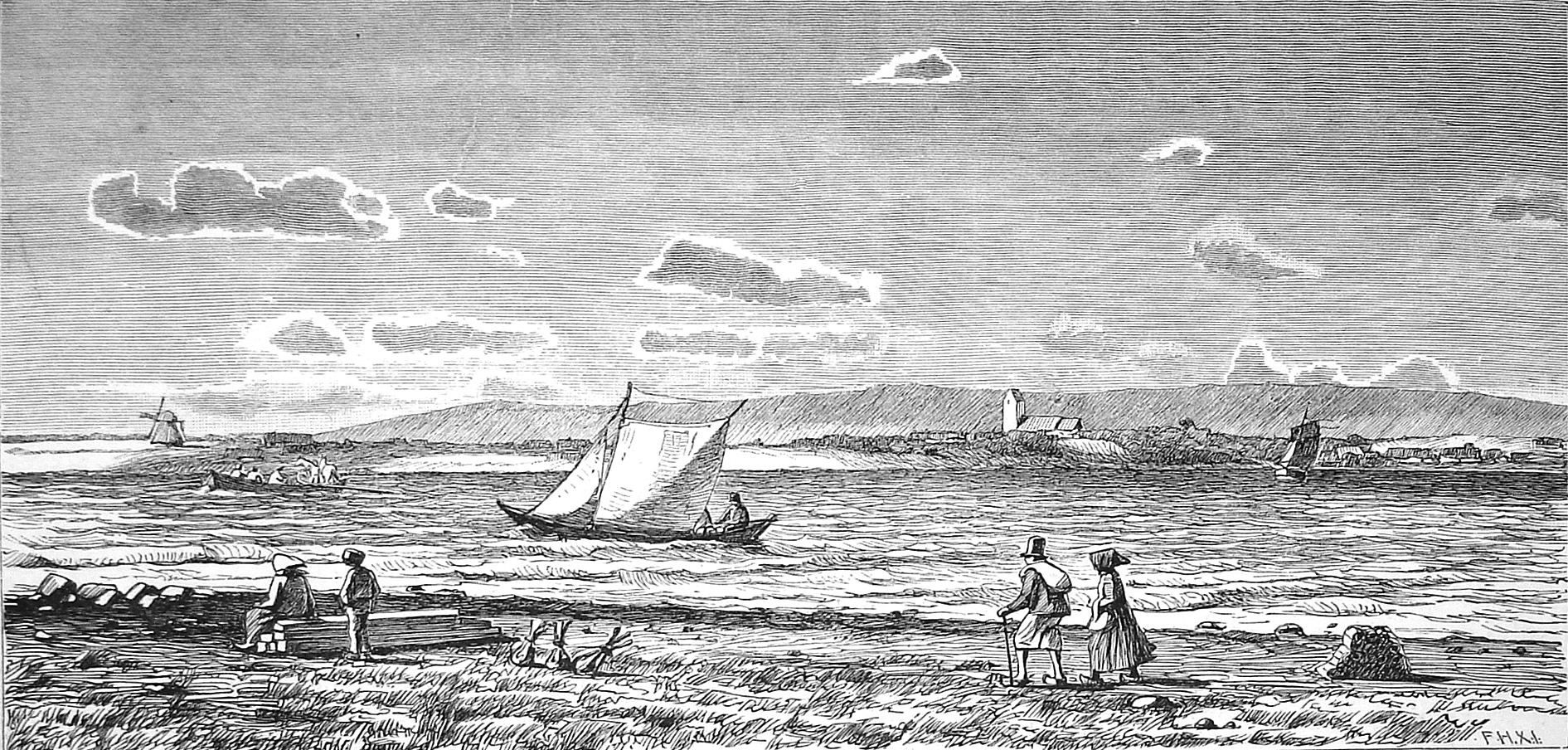 Fur Sund i Limfjorden, Denmark